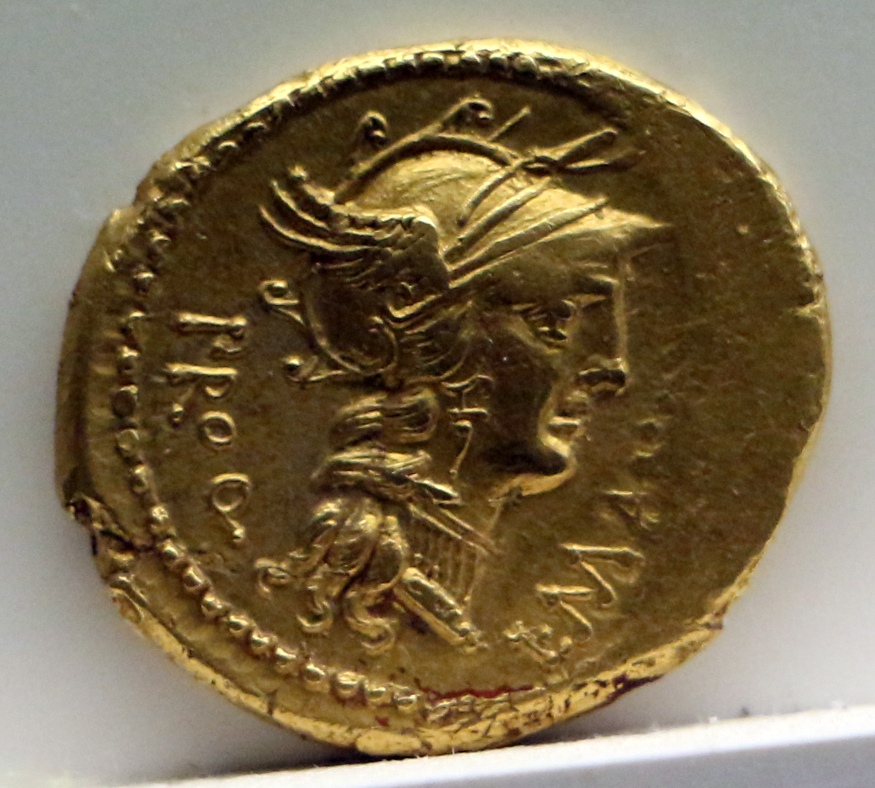 Museo Archeologico Nazionale di Aquileia This is a photo of a monument which is part of cultural heritage of Italy.